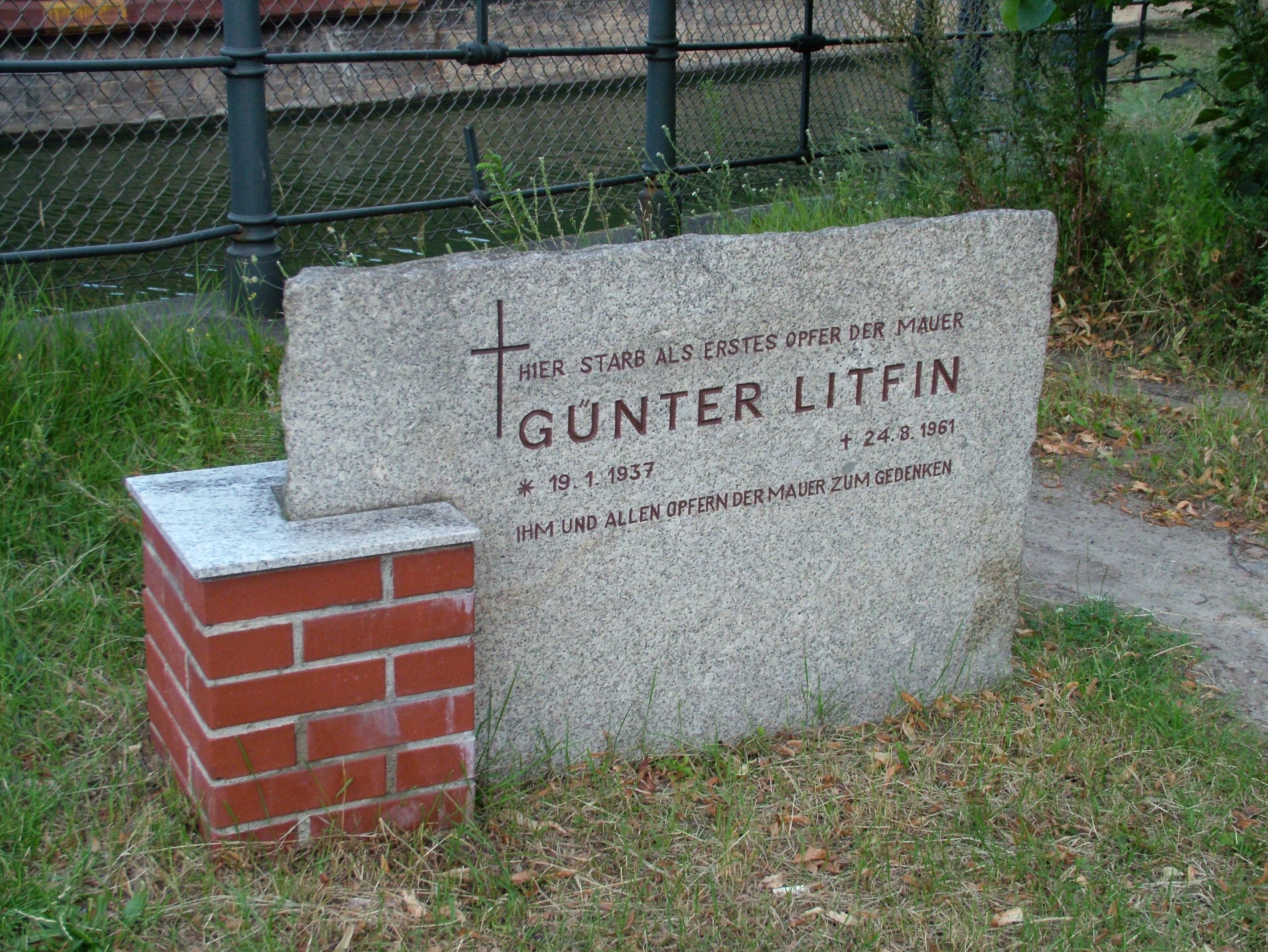 Gedenkstein für Günter Liftin an der Sandkrugbrücke, Invalidenstraße gegenüber dem Hamburger Bahnhof